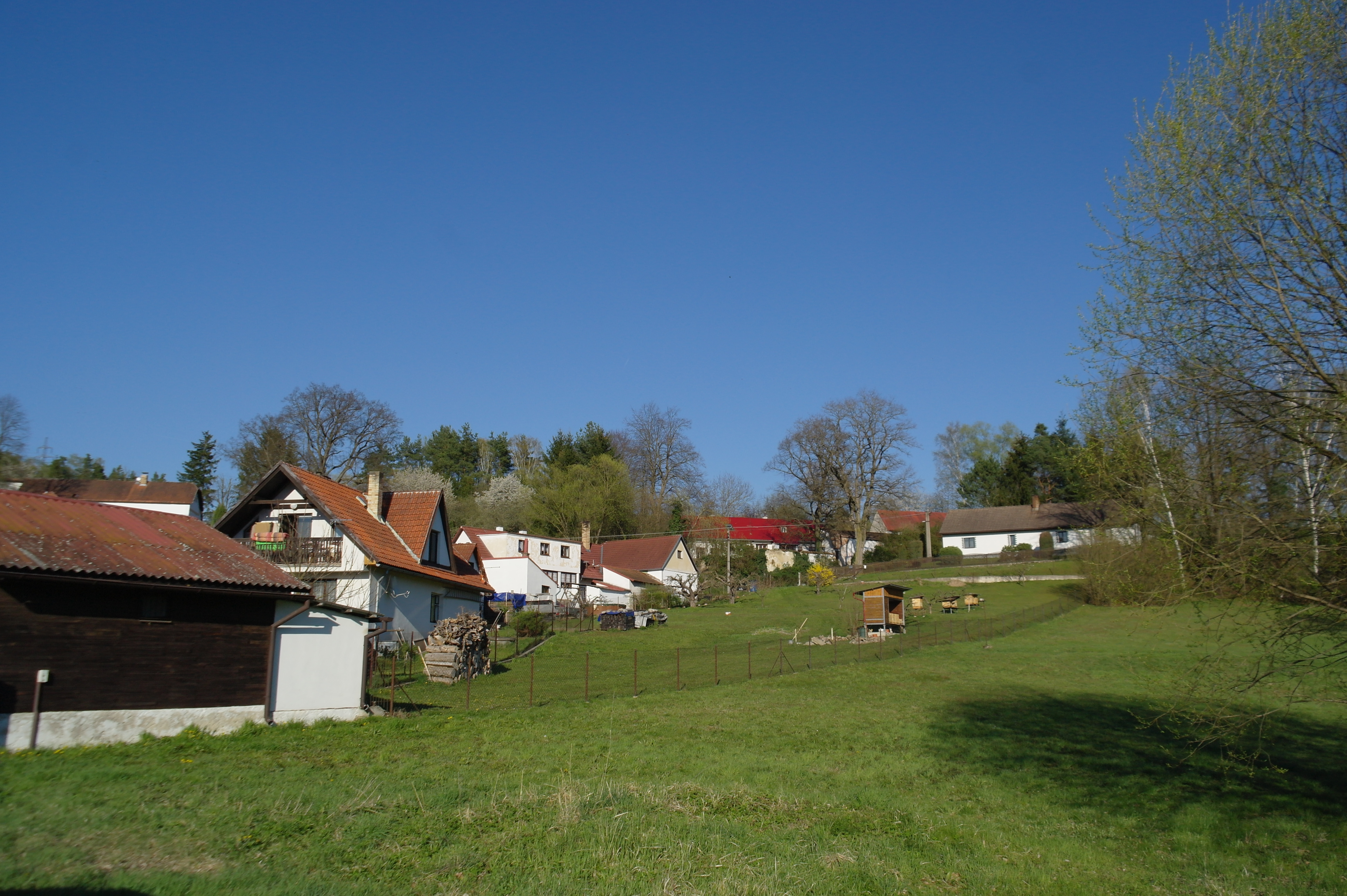 Hutě (Černýšovice), domy ve východní části vesnice